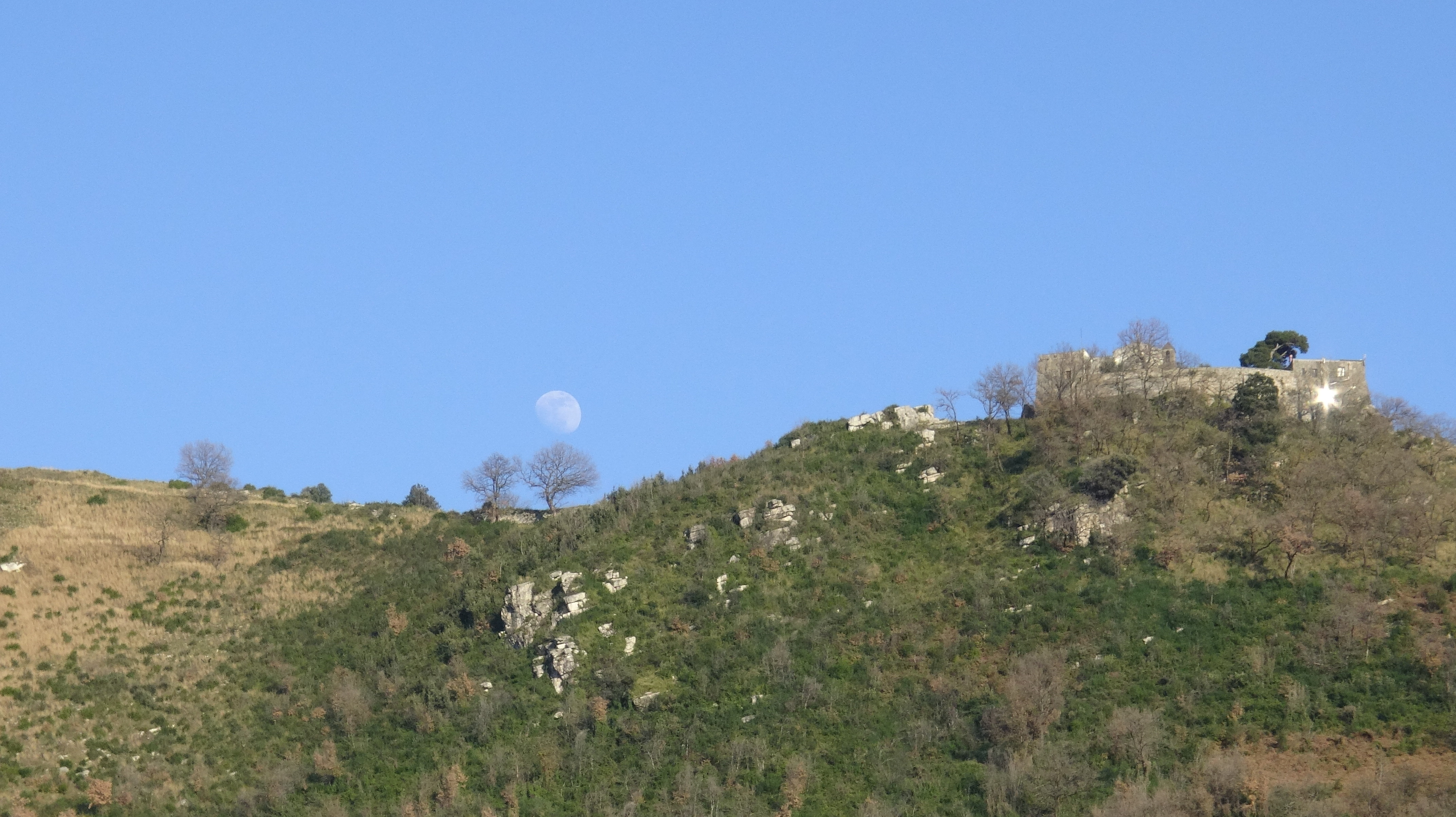 {Informazioni file |Descrizione =Eremo di Castel San Giorgio, visto da Fiano di Nocera Inferiore. |Fonte = Mariano Rocco |Data = 16/02/2019 |Autore = Mariano Rocco |Licenza = vedi sotto |Detentore copyright = Mariano Rocco |EDP = |Altre versioni =}